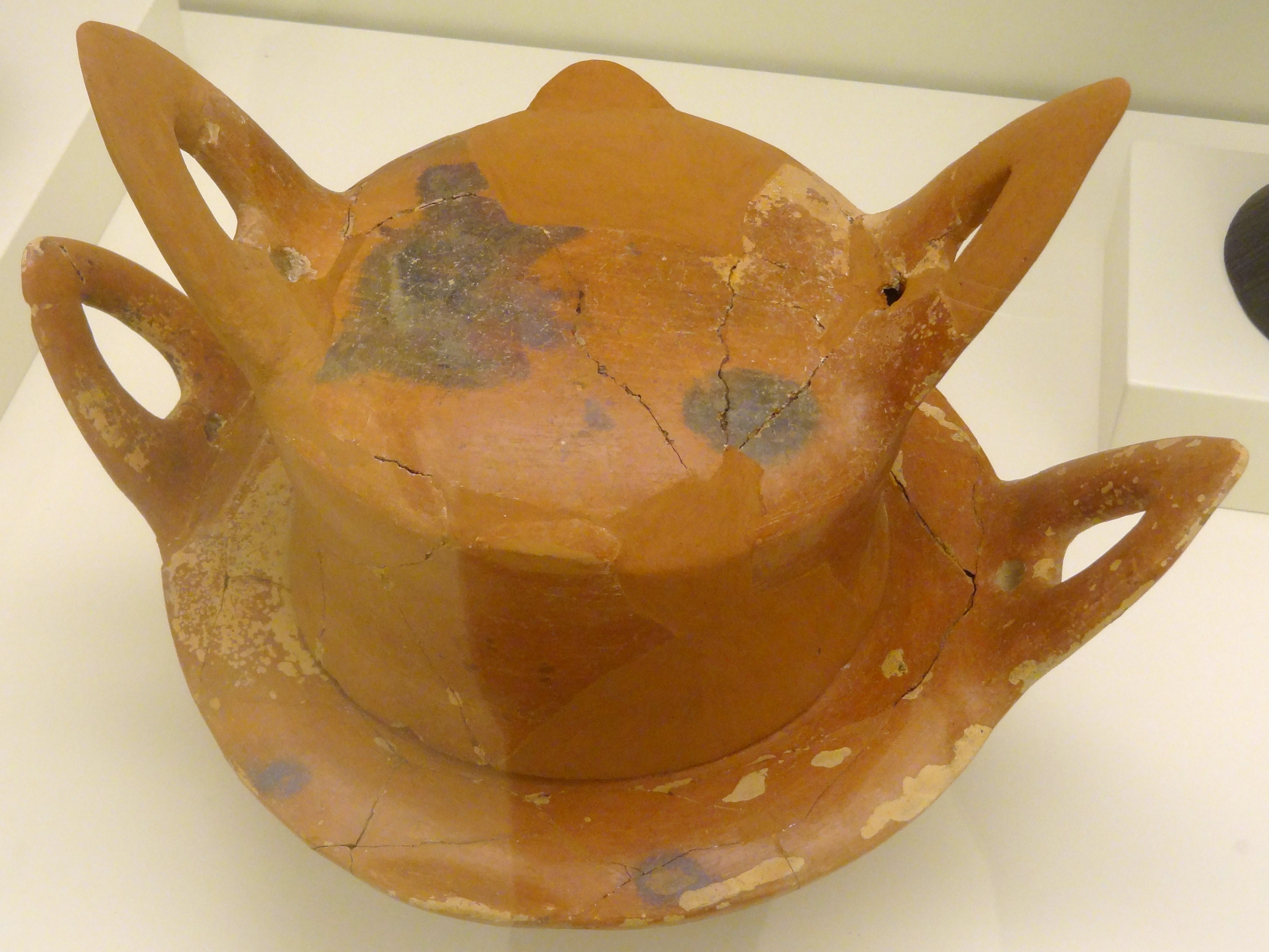 Tonvase mit Deckel und großen Henkeln (Vorpalastzeit, 2800–2500 v. Chr.) aus Lendas (Messara), ausgestellt im Archäologischen Museum Iraklio, Kreta, Griechenland